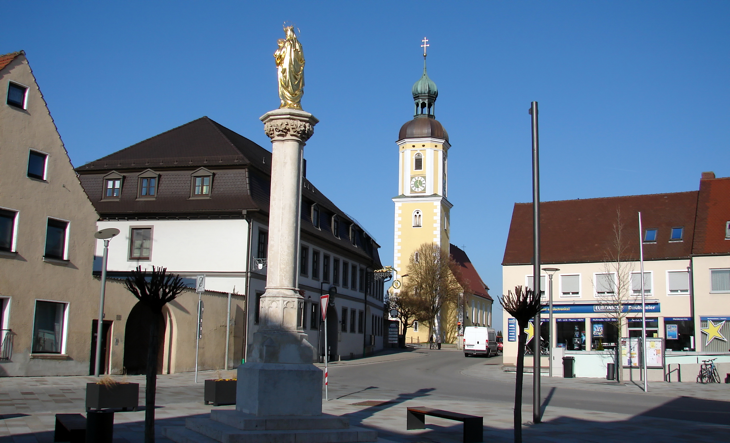 Steinsäule von 1871 auf Sockel mit vergoldeter Marienstatue auf dem Marienplatz in Großmehring.